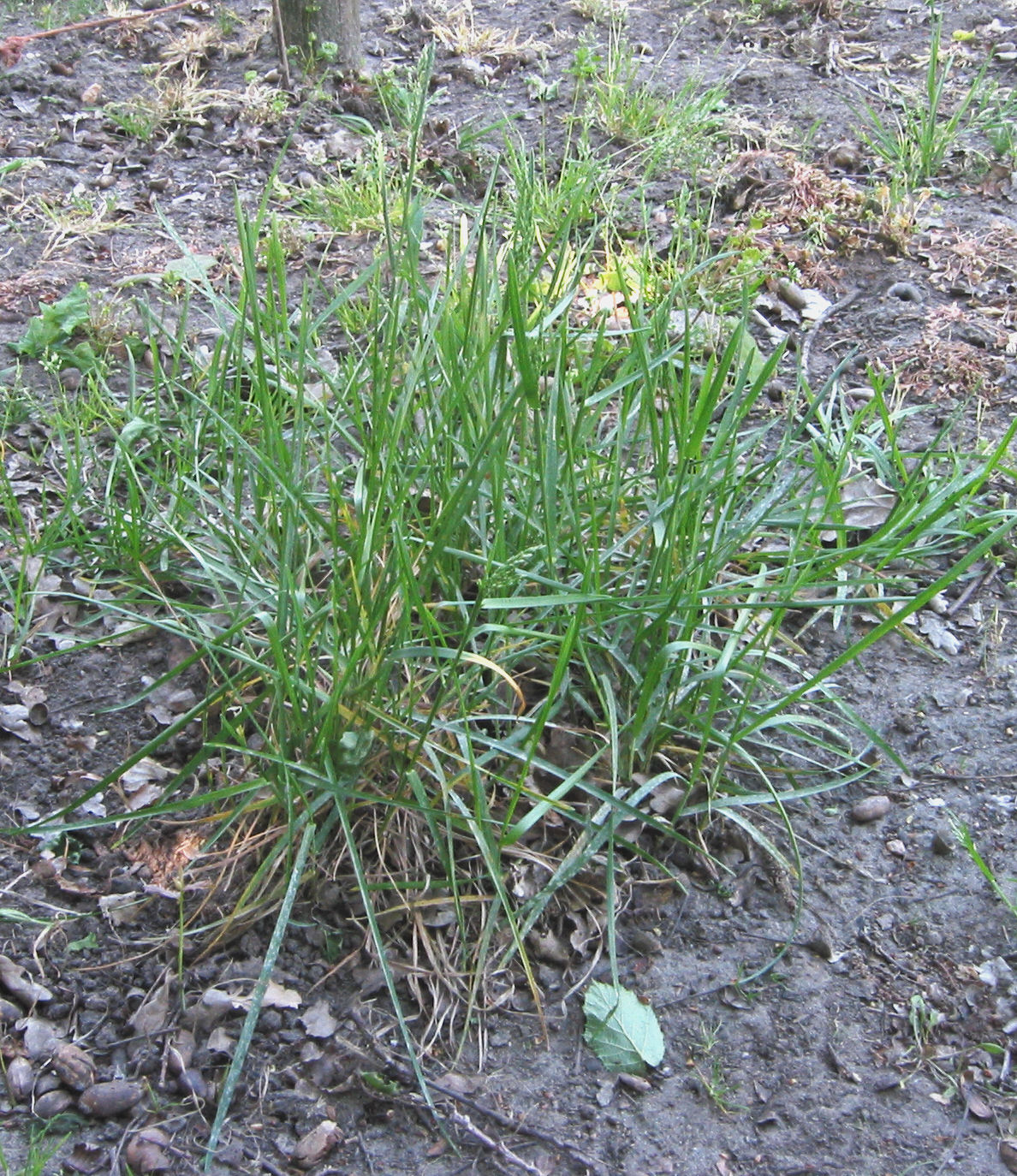 Poa pratensis (Veldbeemdgras plant).